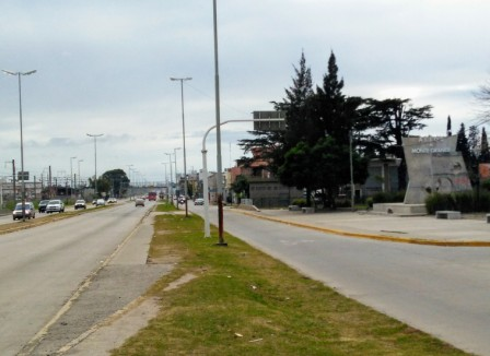 Fotografia tomada desde la Ruta 205. La misma es la principal via de acceso a la ciudad. A la derecha se puede ver uno de los dos bajo niveles que comunican el este y oeste de la ciudad, cuya estacion de trenes se puede ver al fondo izquierdo.